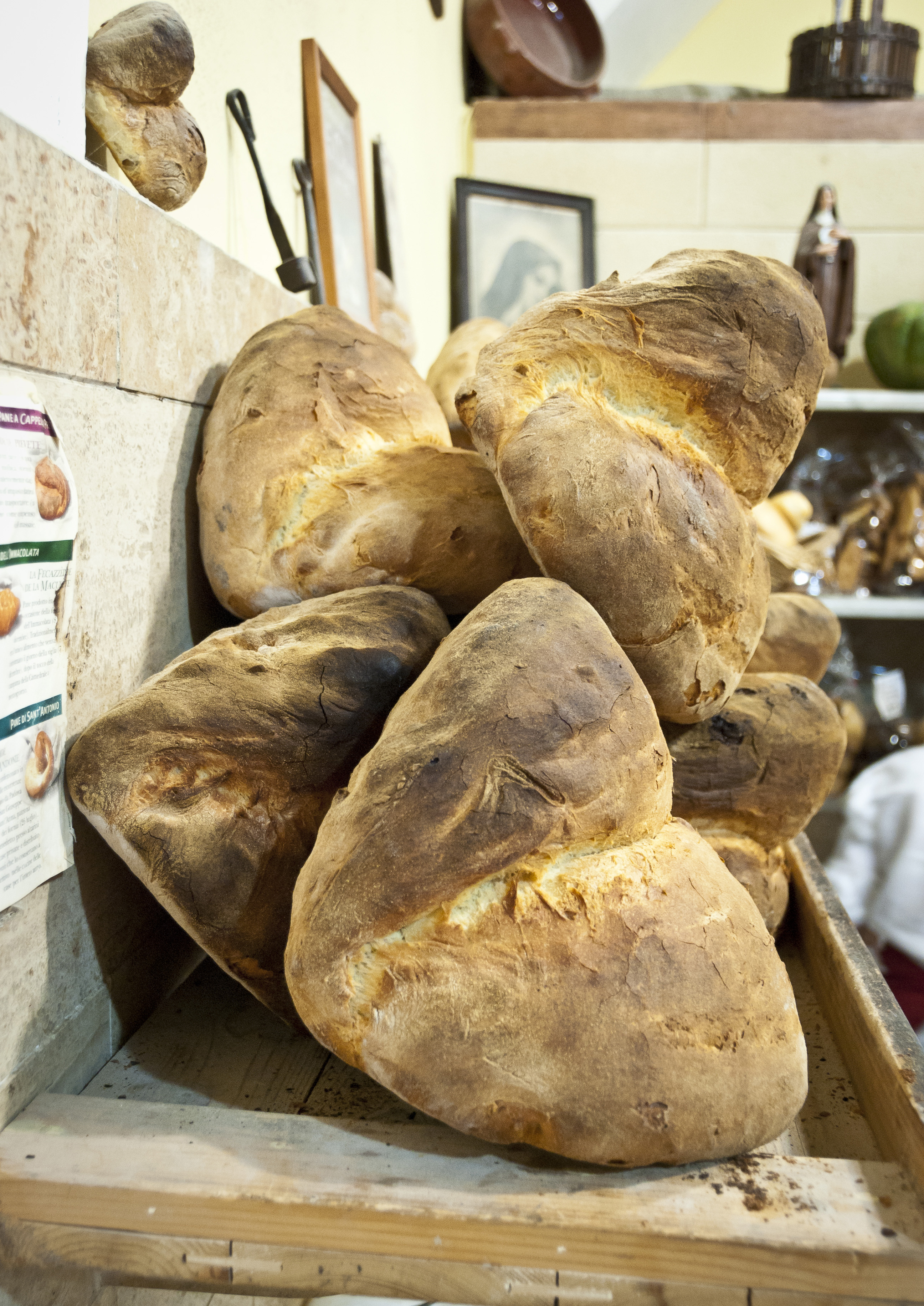 Pane tradizionale di Altamura – Italia.